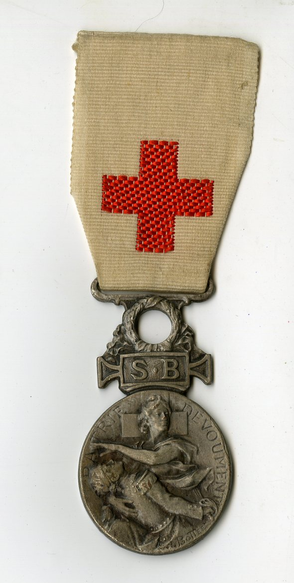 Cécile Brocheton est née le 4 juin 1891 à Le Creusot (Saône-et-Loire, France). Pendant la guerre, elle occupe le poste d'infirmière Croix Rouge à l'hôpital Rosa Bonheur en Seine-et-Marne (1915-1916). Elle décède le 19 décembre 1971 à Champagne-sur-Seine (Seine-et-Marne).